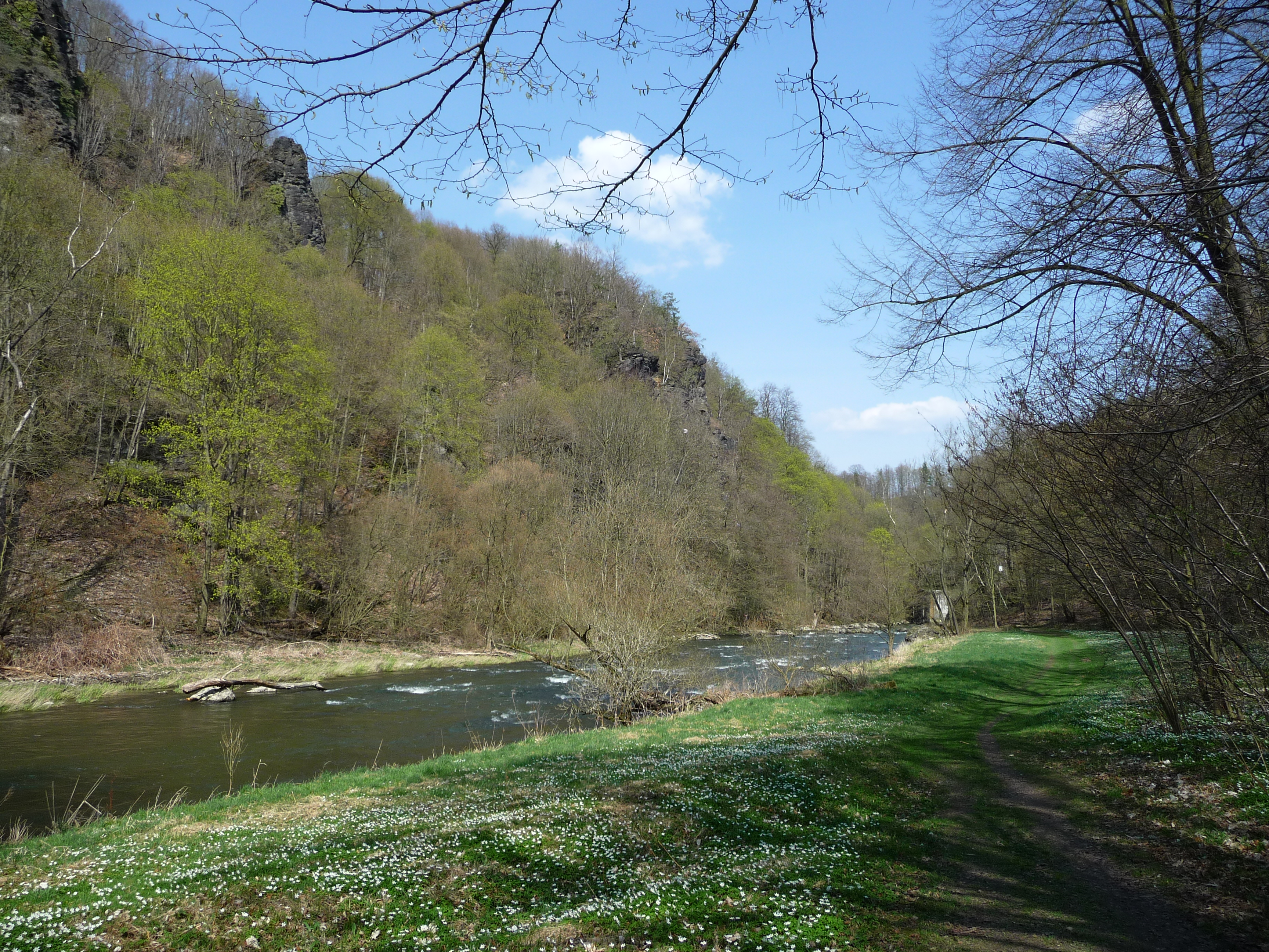 Weiße Elster im Steinicht im Frühling, Abschnitt zwischen der Rentzschmühle und Elsterberg (im Hintergrund eine der Eisenbahnbrücken, evtl. an der Landesgrenze Sachsen/Thüringen)